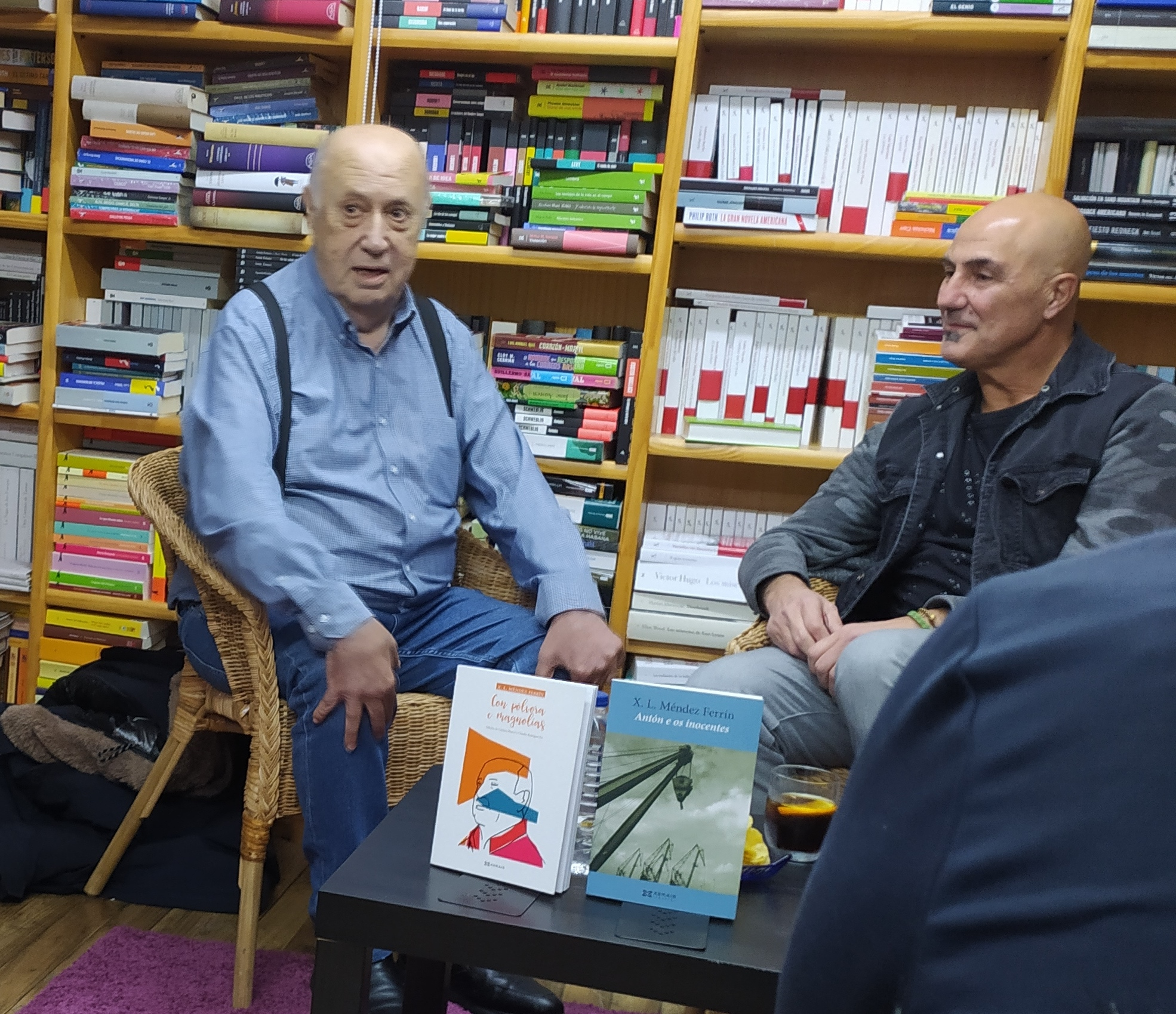 Xosé Luís Méndez Ferrín e Antón Lopo na Libraría Paz de Pontevedra dialogando sobre "Antón e os inocentes"